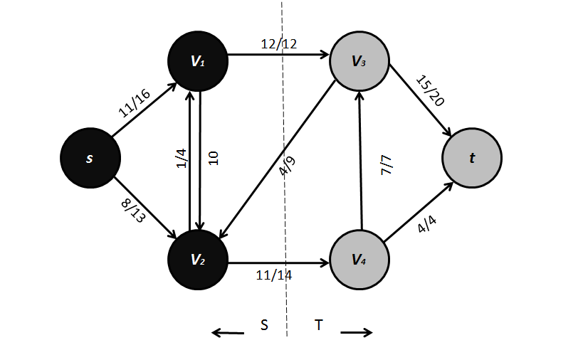 Малюнок 2. Розріз (S, T) транспортної мережі, представленої на рисунку 1 (б), S = {s, v 1 , v 2 }, T = {v 3 , v 4 , t} . Вершини, що належать S , відзначені чорним кольором, а вершини T - білим.